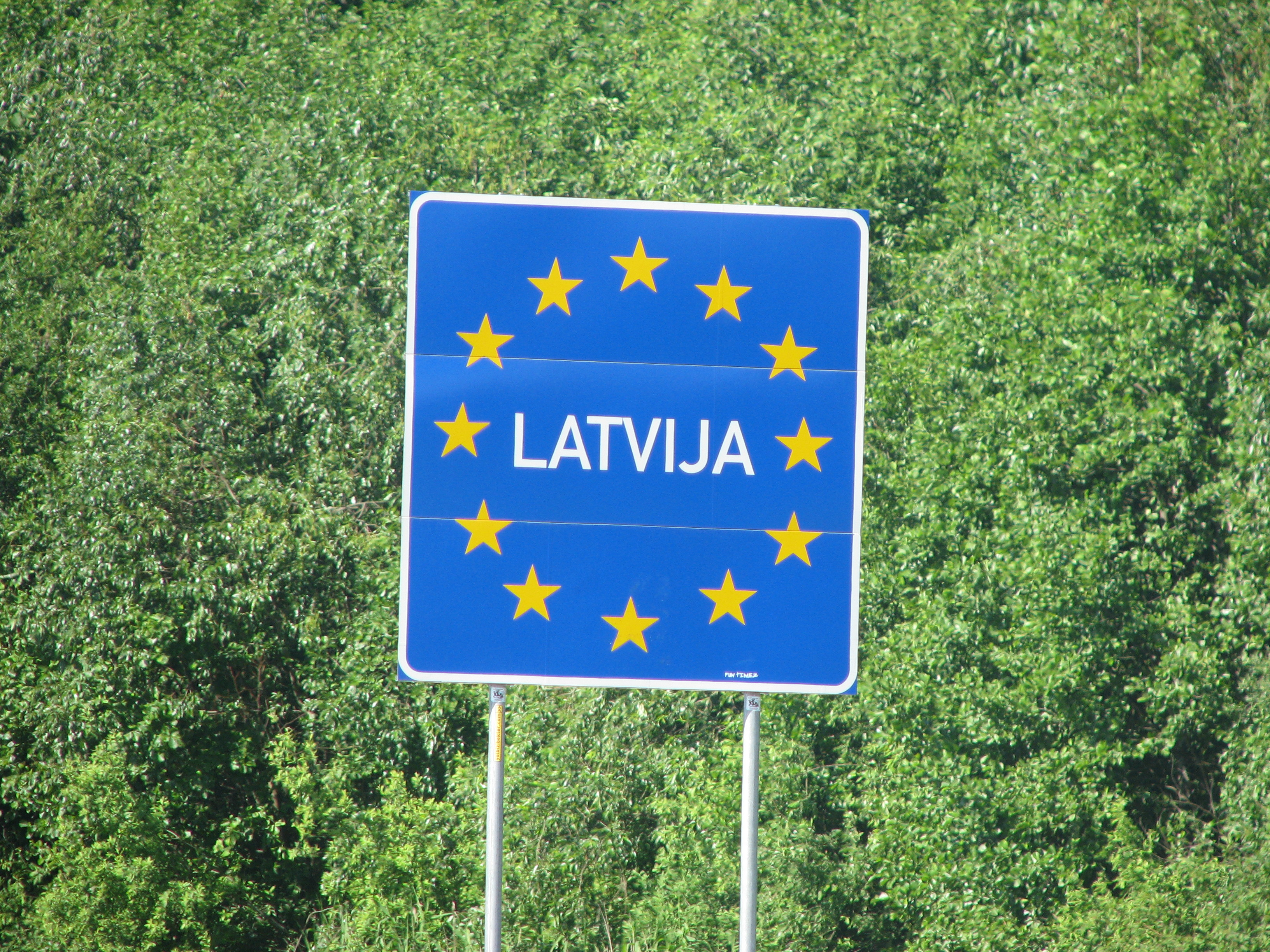 Zīme nr. 749 "Valsts nosaukums" no Igaunijas iebraucot Latvijā (Iklas-Ainažu robežpunkts).